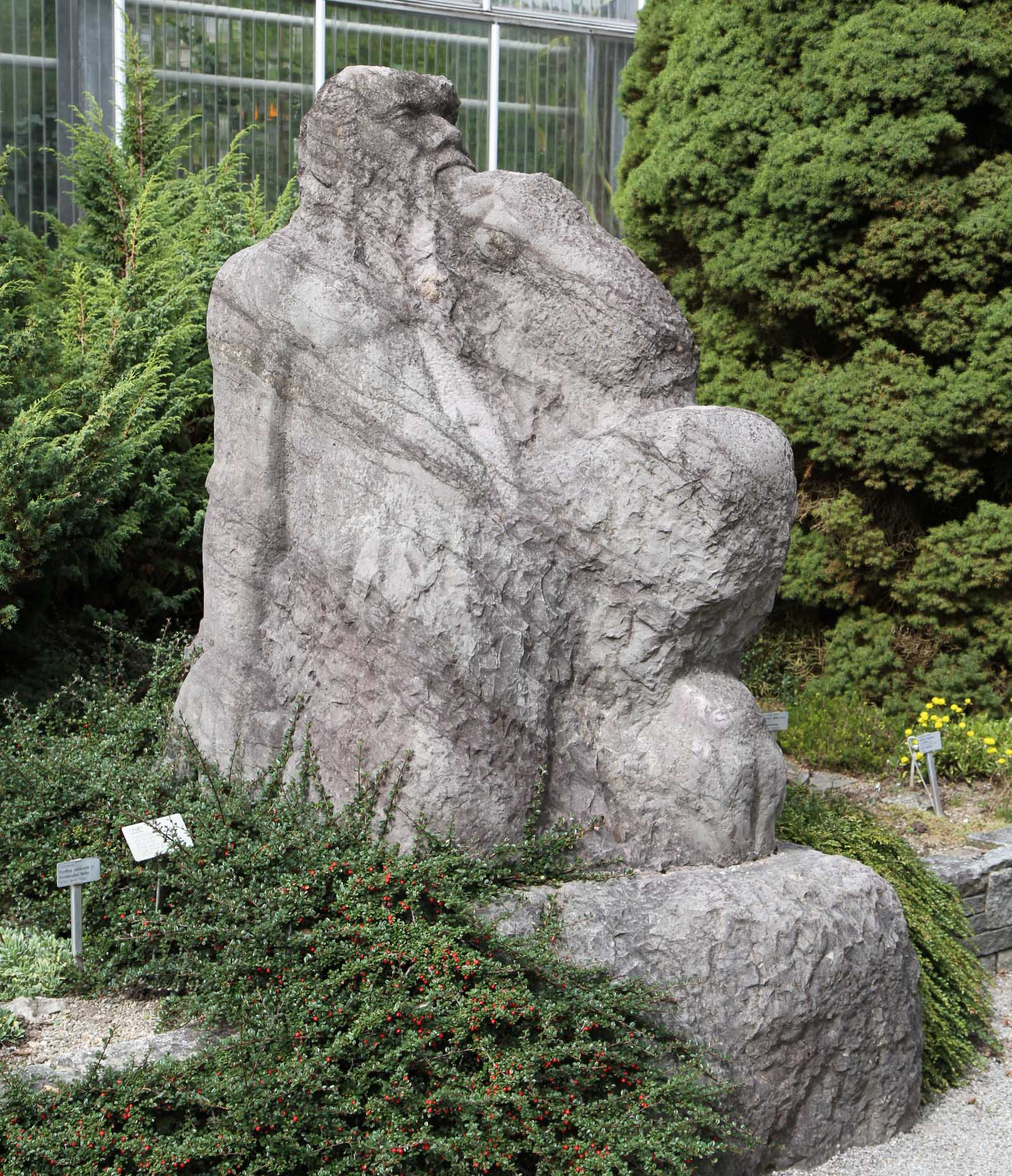 Panfigur im Botanischen Garten (1957), St. Gallen